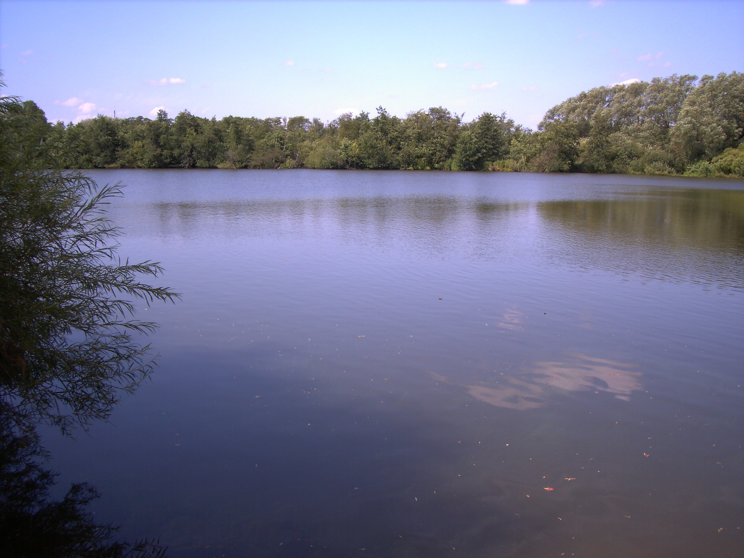 Der Tröndelsee in Kiel, in Richtung Westen fotografiert; links ist noch die Spitze des Fernmeldeturms zu sehen